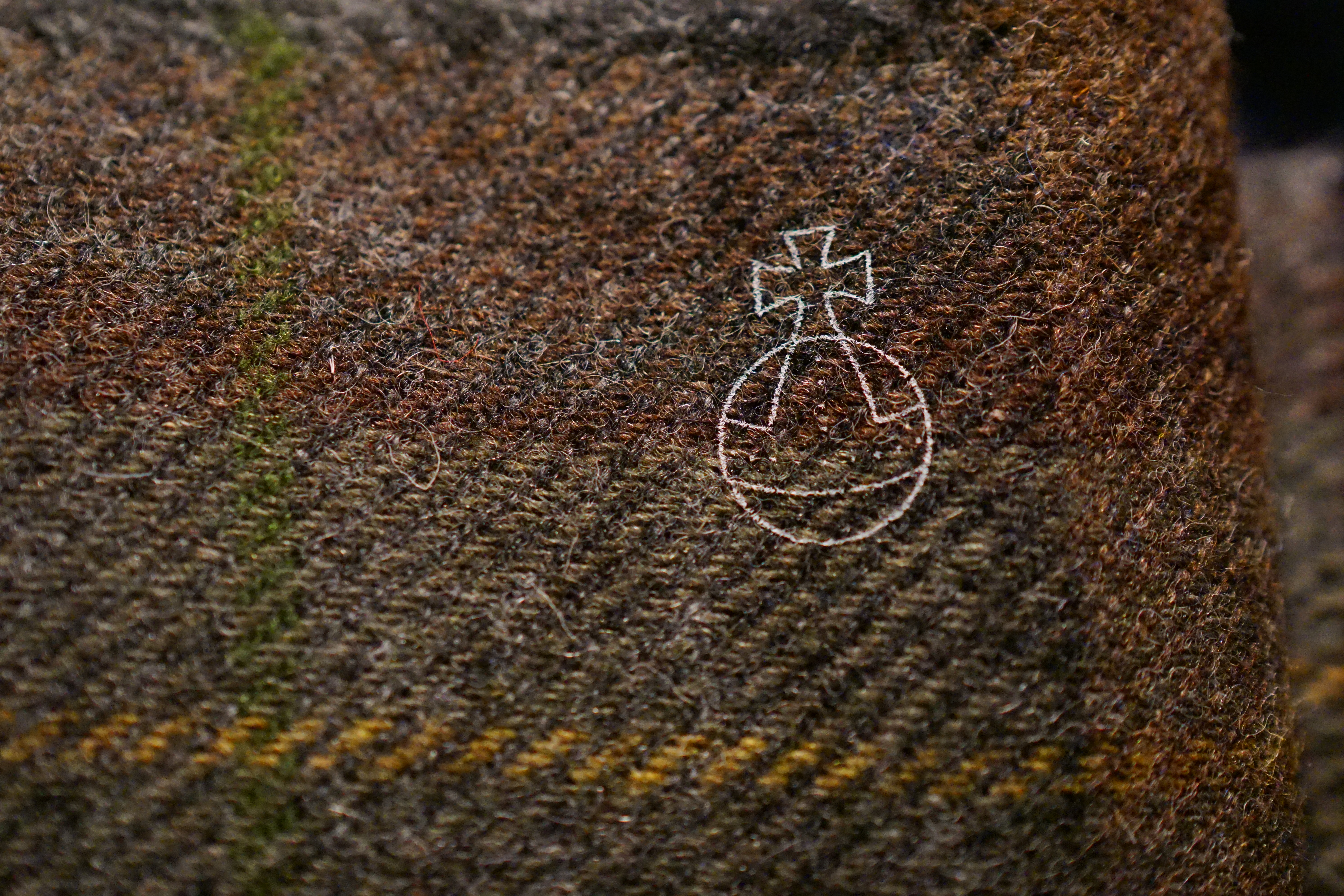 Stempel mit Reichsapfel (Orb) aufgedruckt auf einem original Harris Tweed. Dieser Stempel ist handgewobenen Stoffen vorbehalten, die den Regeln des Harris Tweed Acts entsprechen.